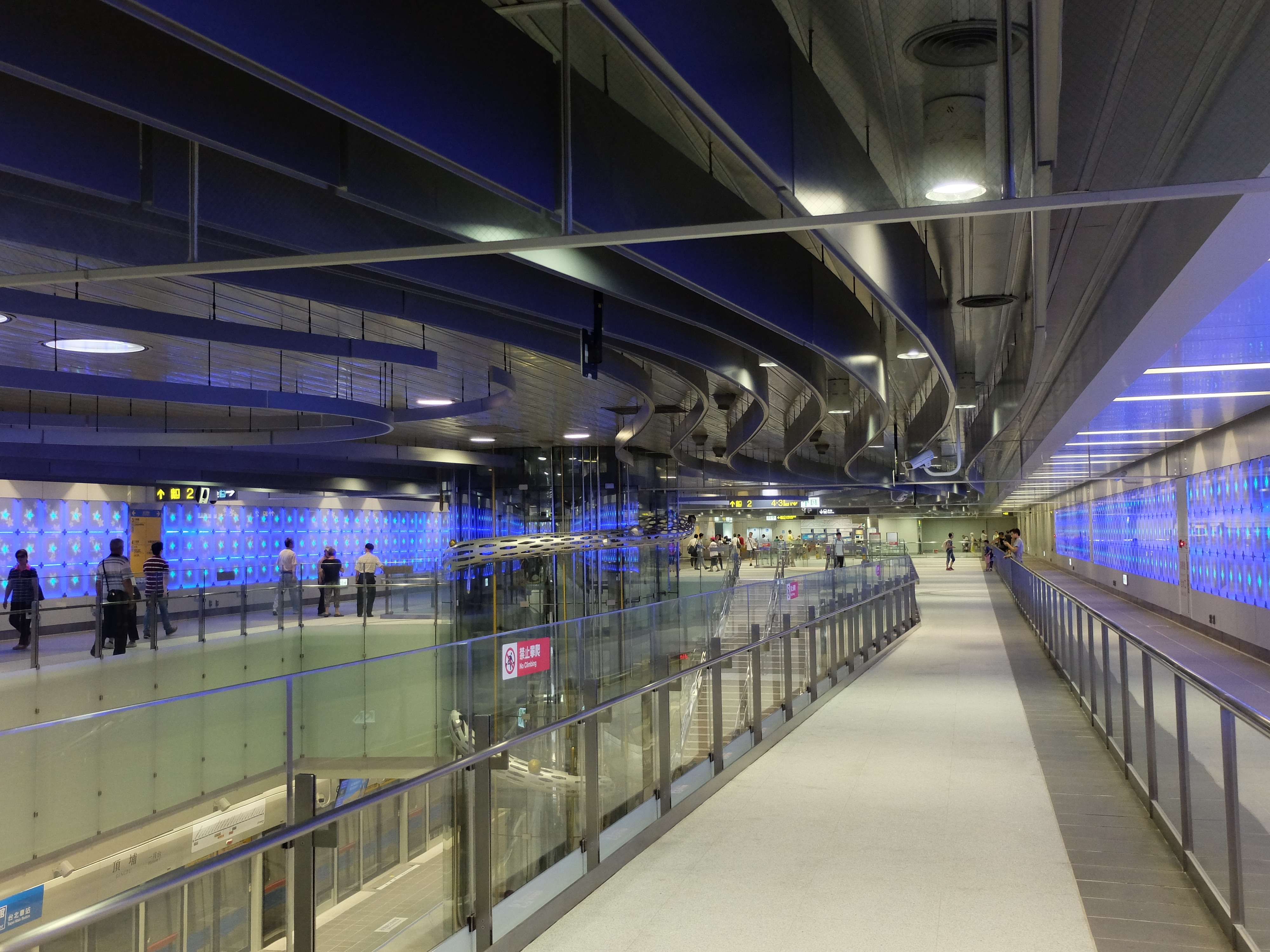 台北捷運頂埔站的大廳層。